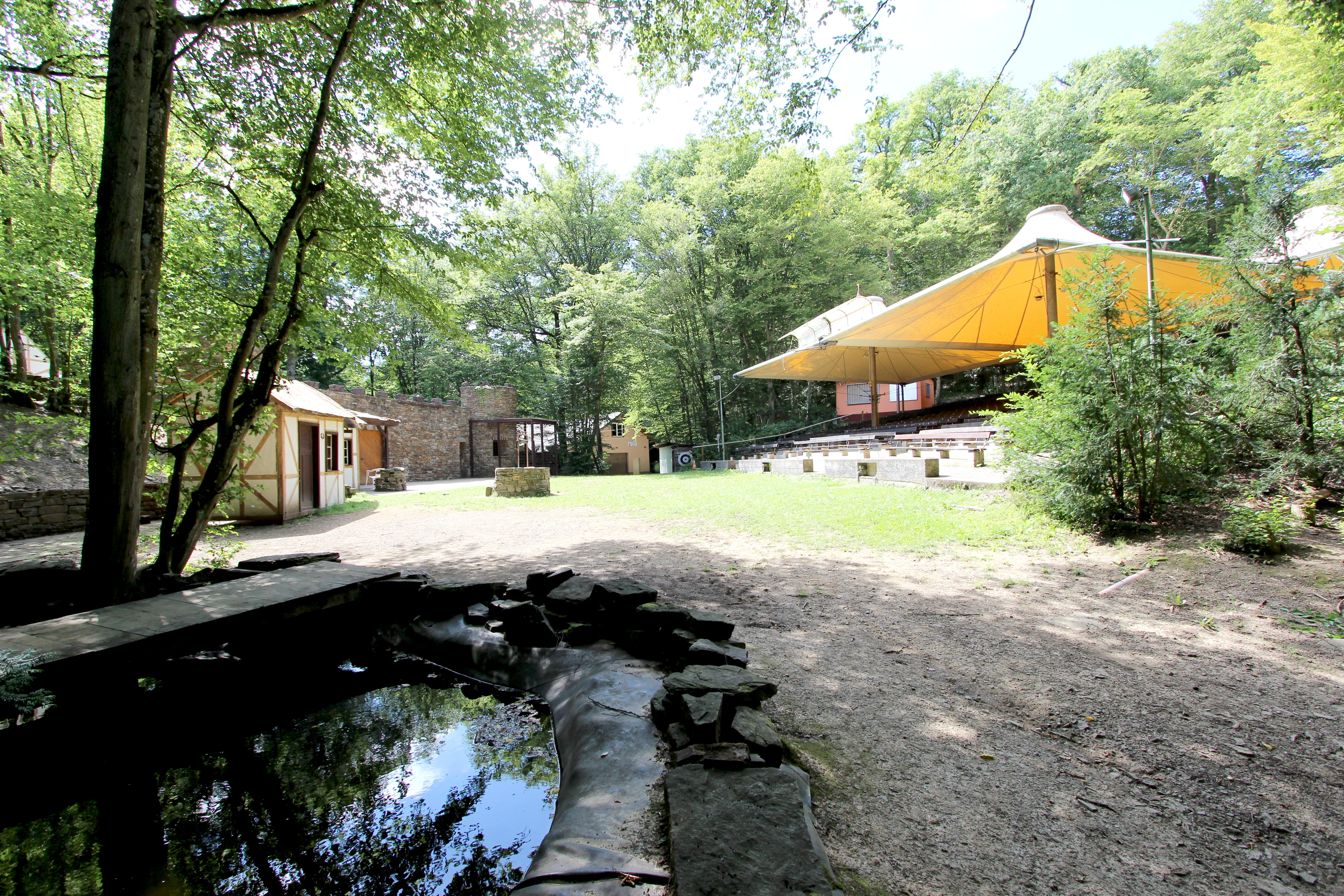 53520 Schuld an der Ahr, südöstlich des Ortes an der K 16; Distrikt "Auf Schorren". Freilichtbühne der Gemeinde mit überdachten Sitzplätzen und Gastronomie. Aufnahme von 2017.